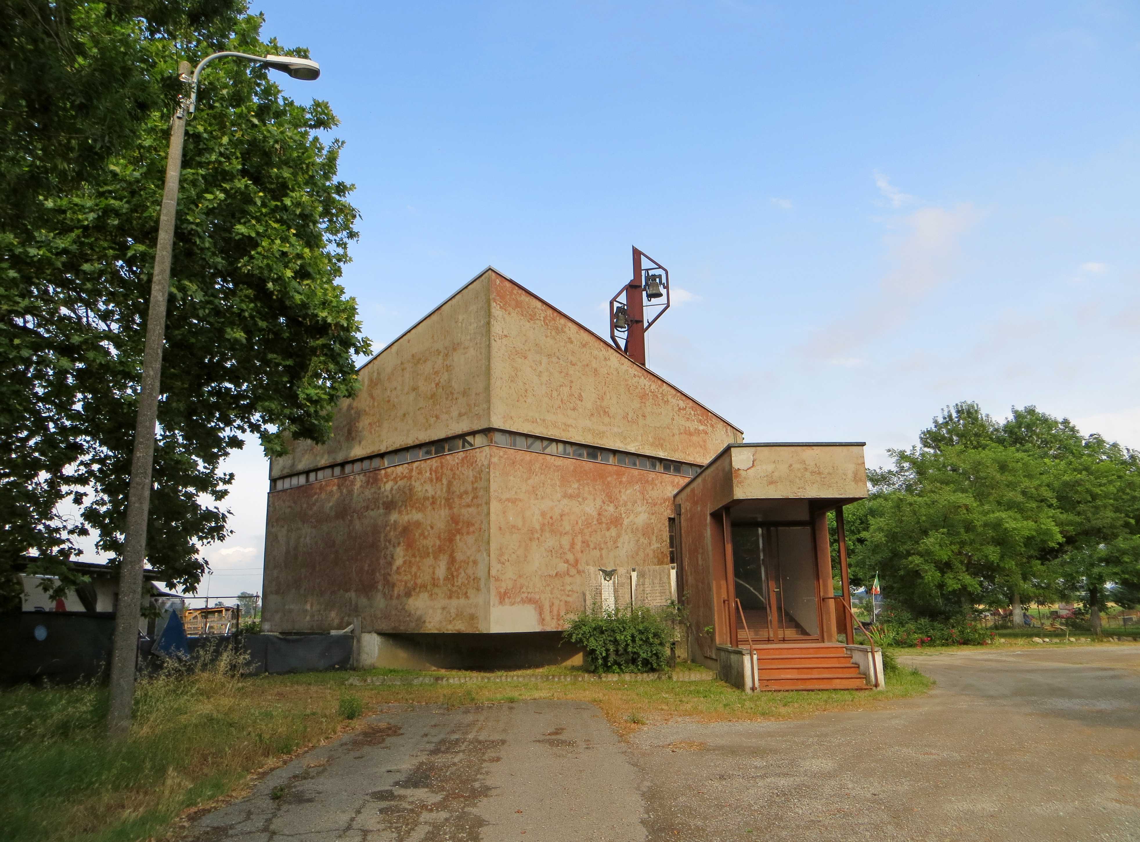 Chiesa di San Pietro Apostolo (Casalbaroncolo, Parma) - facciata